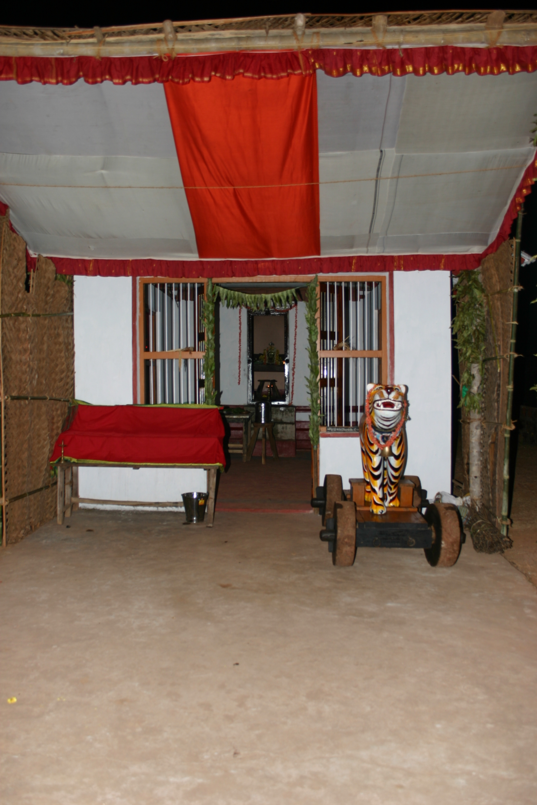 Pandal used for Bhuta Kola